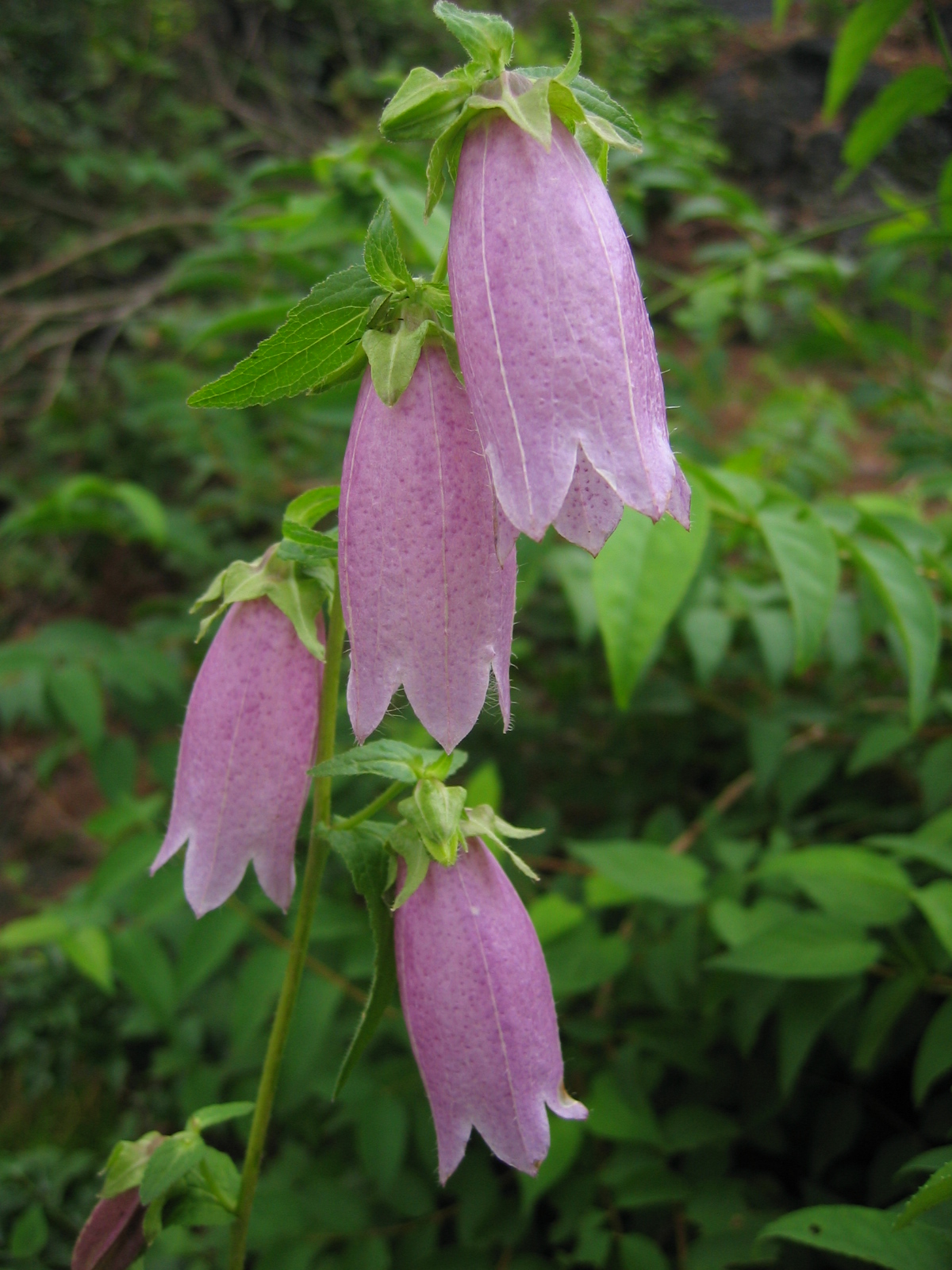 ヤマホタルブクロ (学名:Campanula punctata var. hondoensis) 撮影地：山梨県鳴沢村